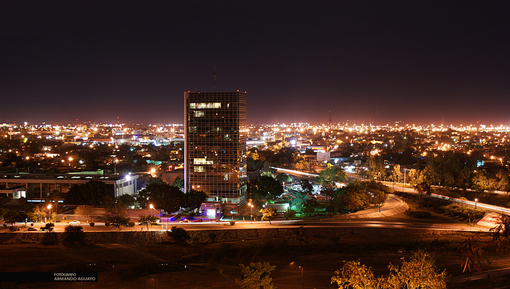 Vista nocturna de Ciudad Victoria, Tamaulipas, México